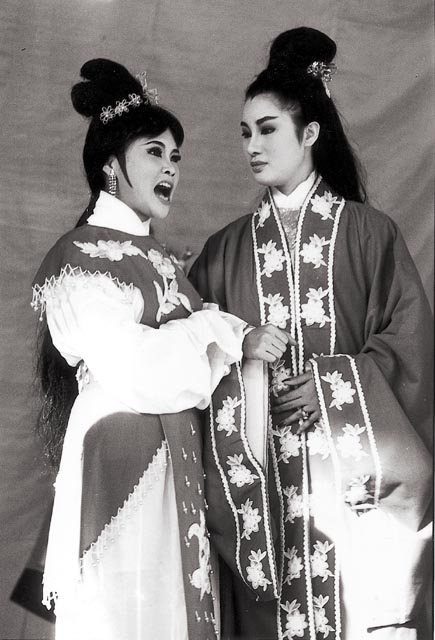 未成名的楊麗花，跟著母親到高雄唱戲的鏡頭 (1962年前)據說，此段時期的楊麗花不但不識字，也還沒學會說"國語"。 While the exact date of her performance is unknown, however, this picture was definitely shot before 1962 and the 50-year protection has expired.